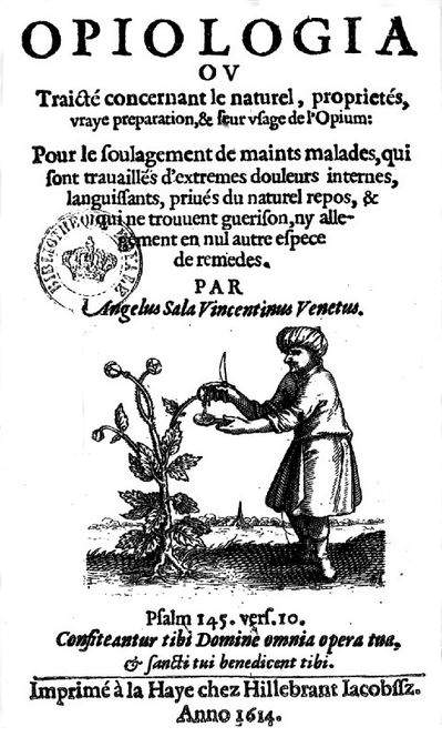 Traité sur l'opium, décrivant les recettes et propriétés médicinale du Laudanum, publié en 1614 à La Haye